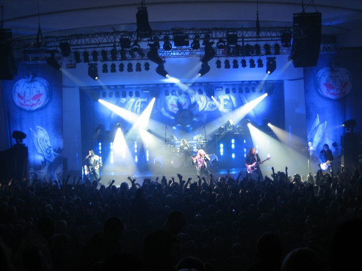 Helloween, Live @ Helsinki 2010